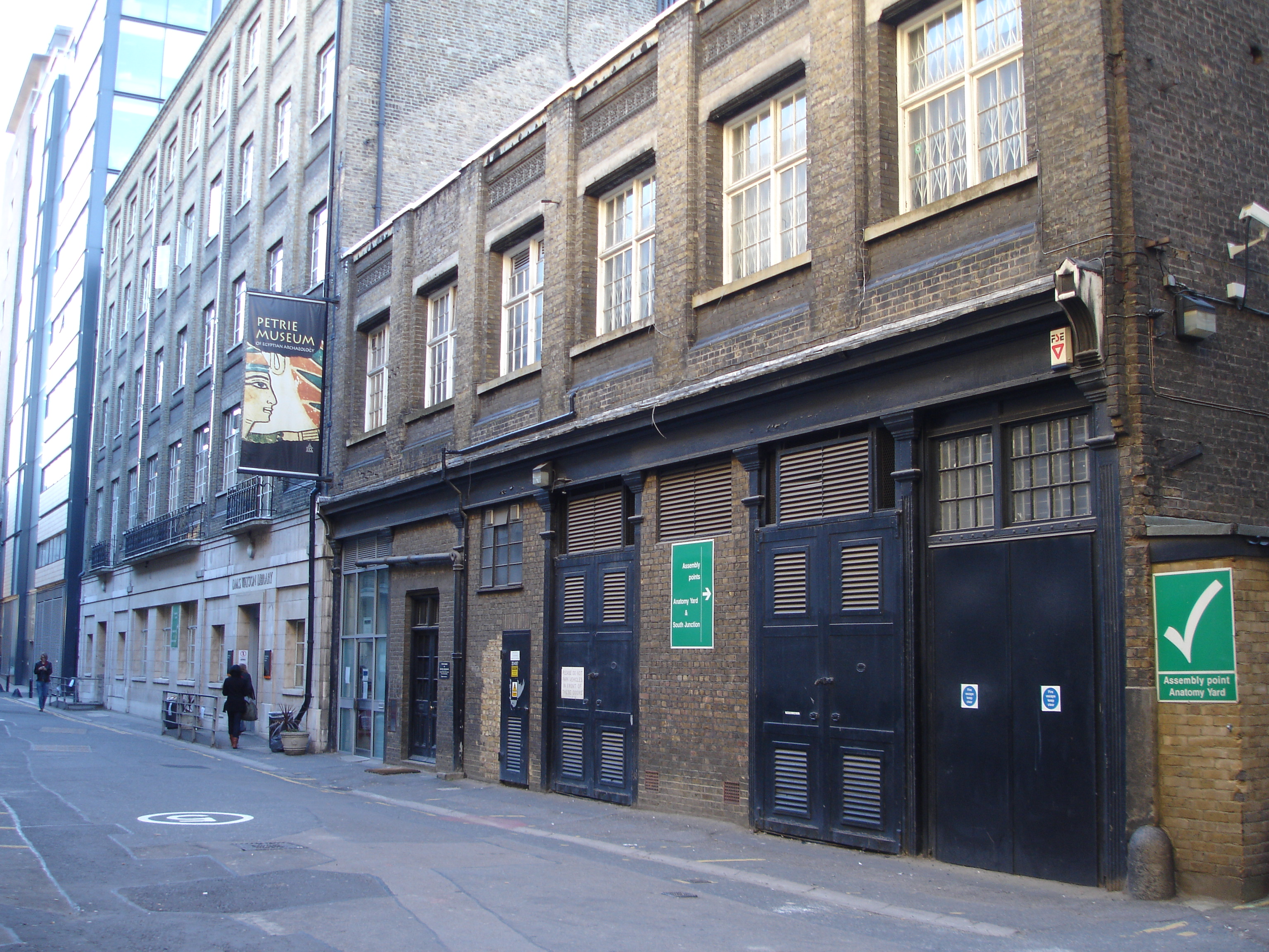 Muzeum Petriego w Londynie